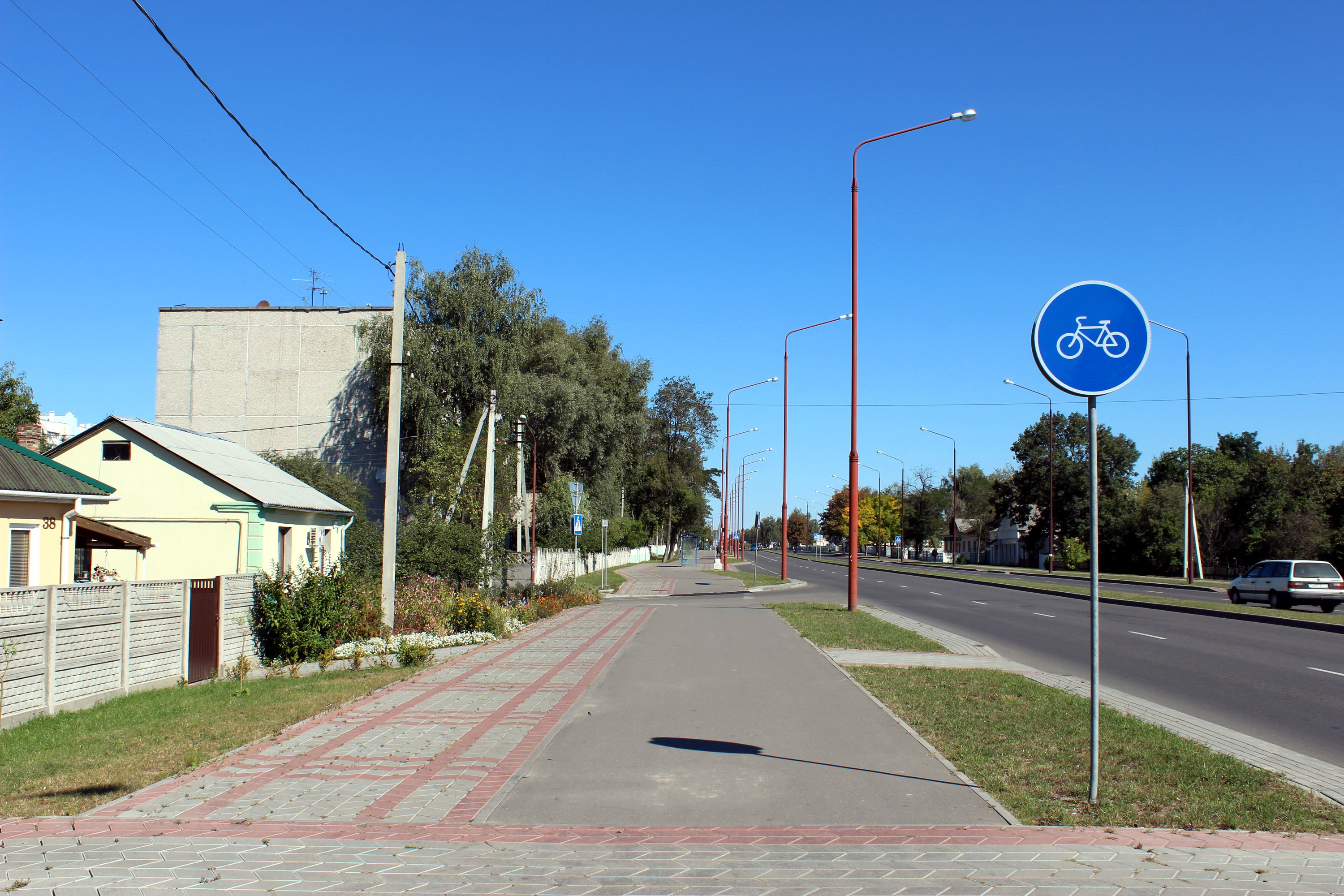 Фактычны пачатак сучаснай веладарожкі